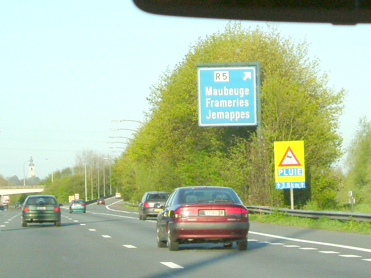 Photo de la bifurcation entre l'autoroute belge A7 et le ring de Mons.